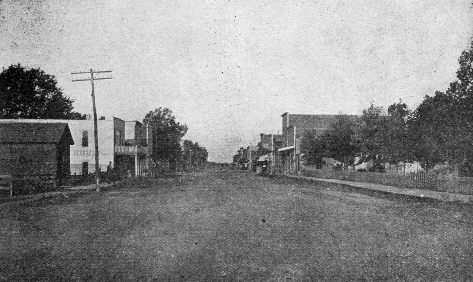 Gentry, Arkansas.